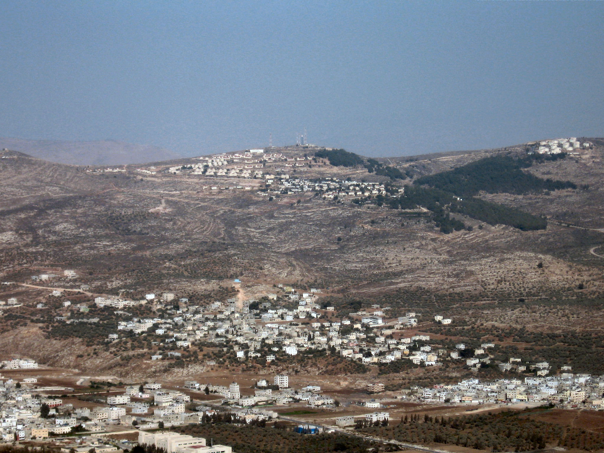 תרבות השומרונים בהר גריזים